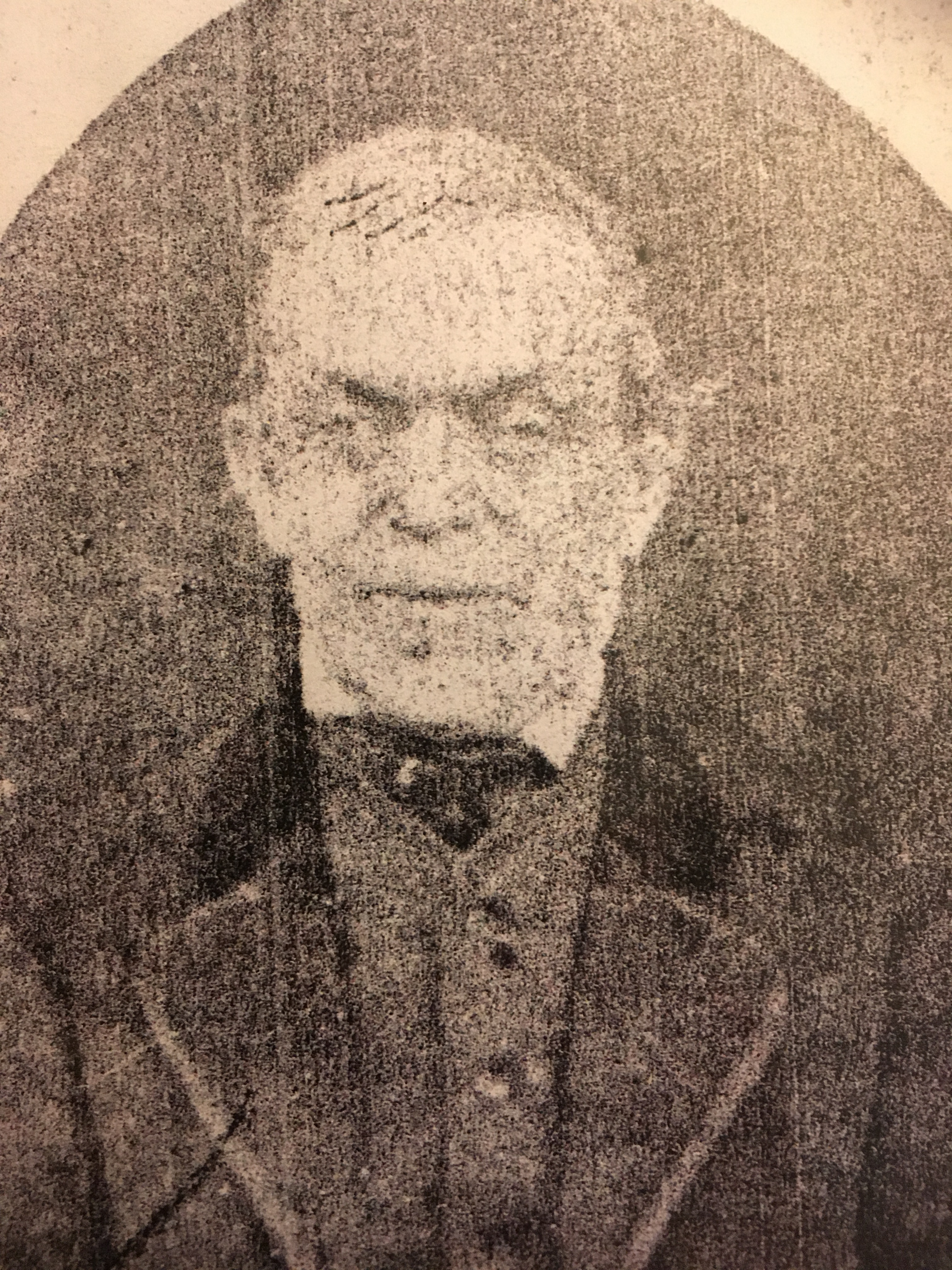 Pieter Albertus Loncke (1821-1897), stichter van Loncke orgelbouw